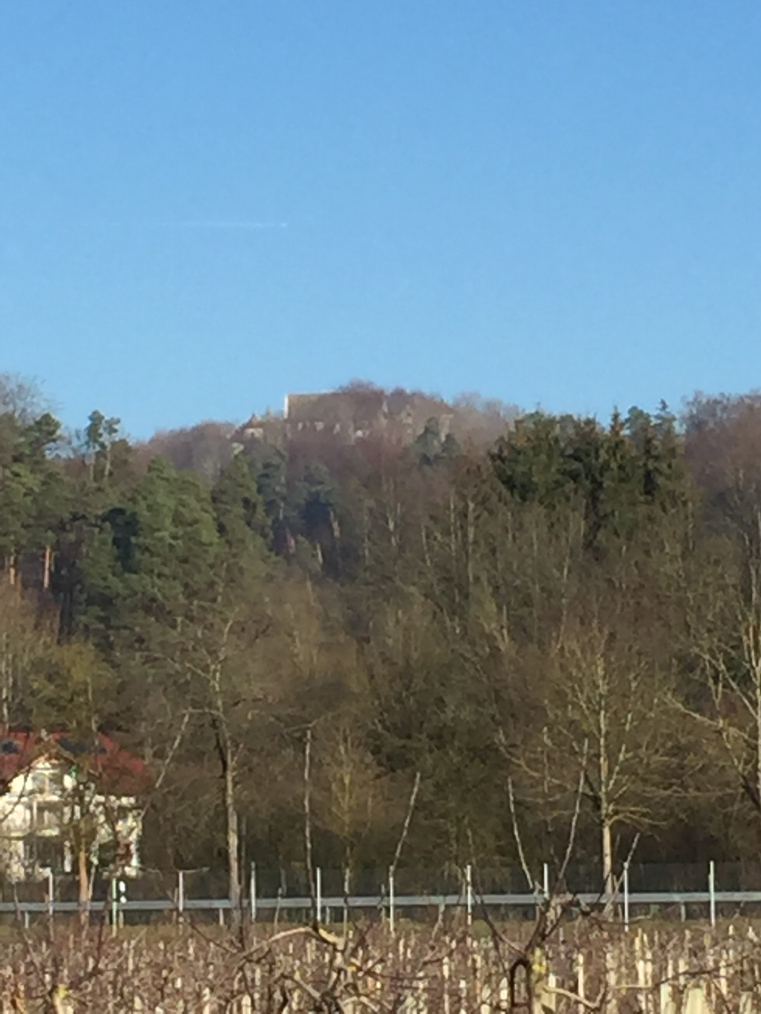 Burg Hohenfels bei Hohenfels